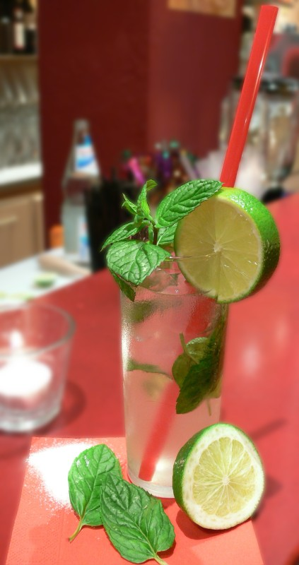 Mojito